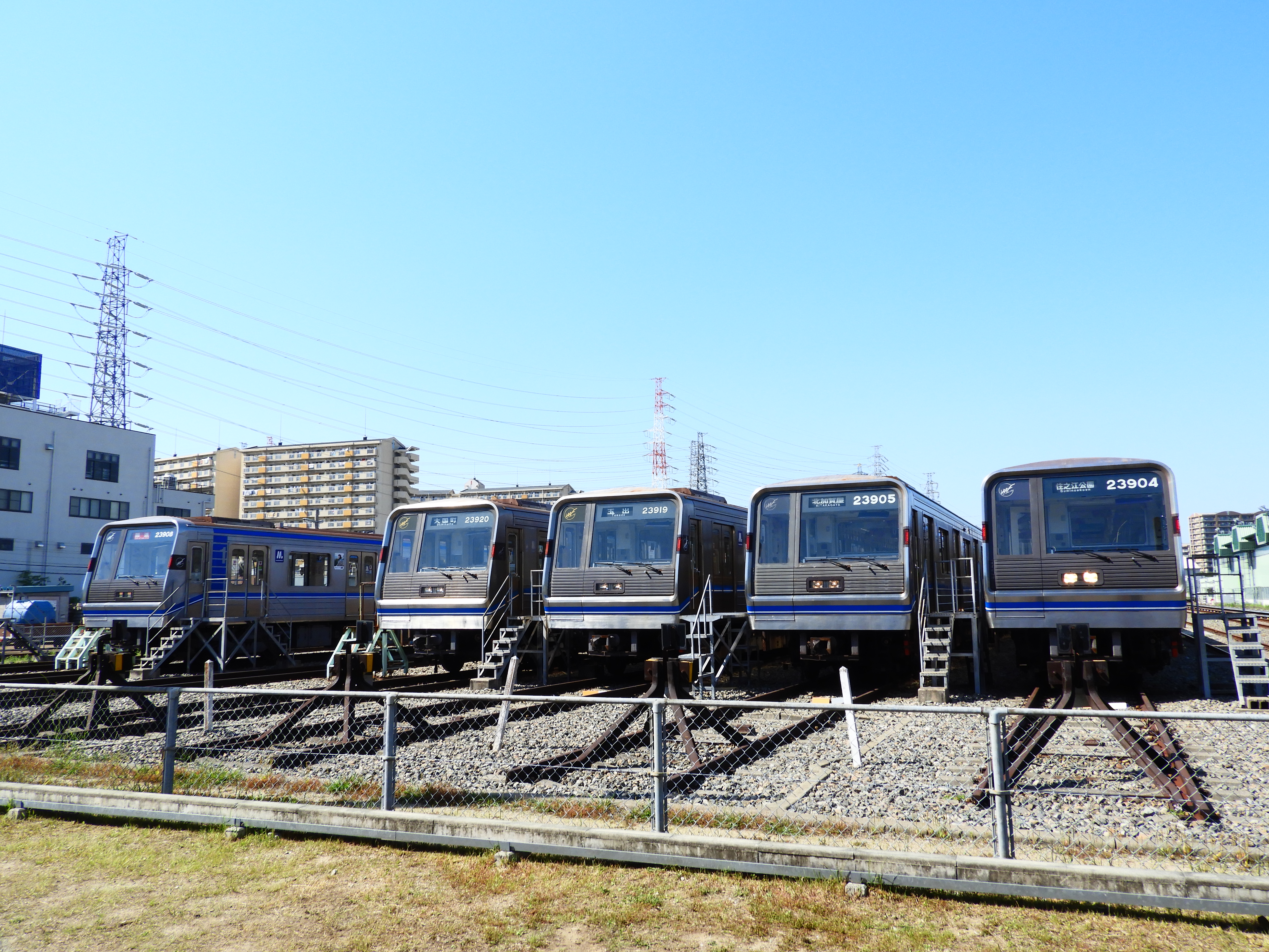 Osaka Metro緑木検車場と23系。公開イベントにて撮影。